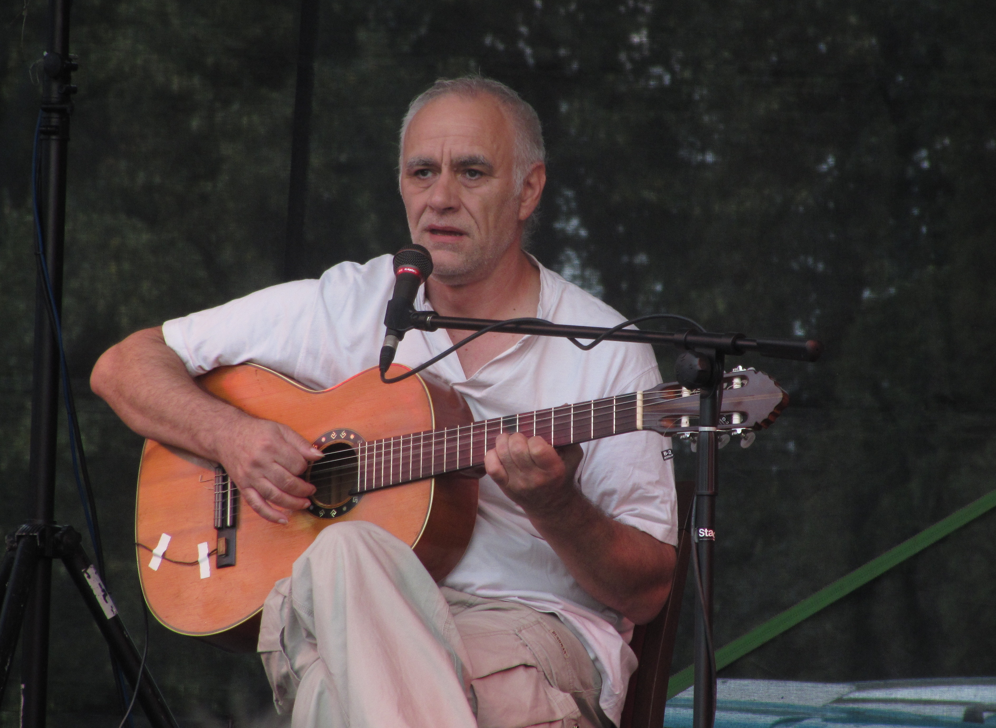 Petr Rímský v Holešově, srpen 2013